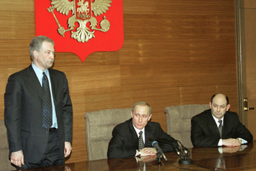 МОСКВА. Представление руководству Министерства внутренних дел нового Министра – Бориса Грызлова.